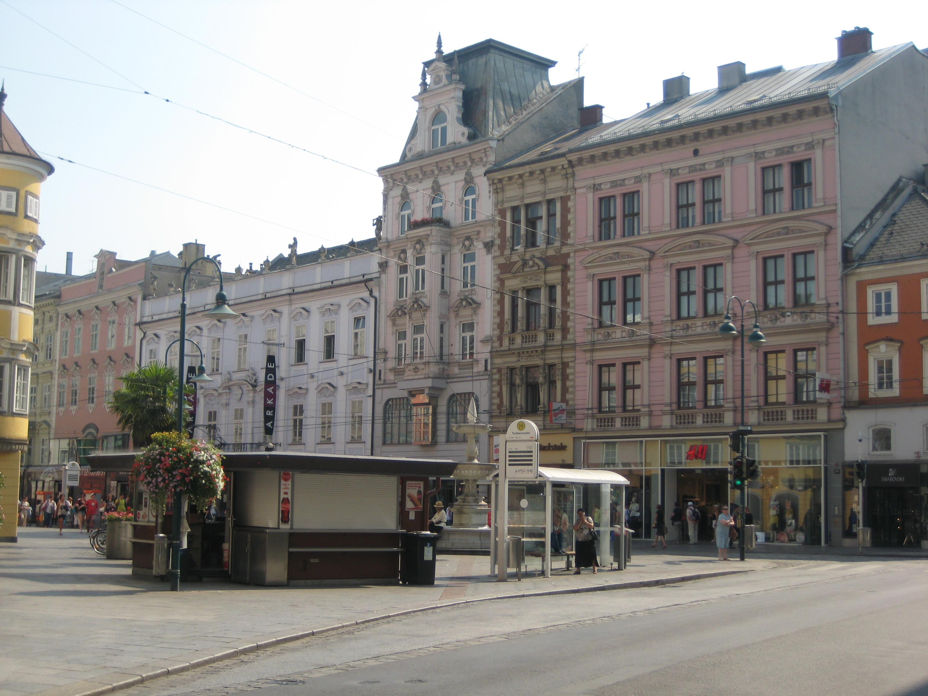 Blick auf den Taubenmarkt (Linz/AT)